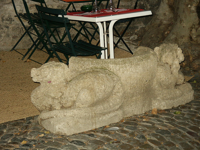 La Tarasque de la rue des Teinturiers à Avignon